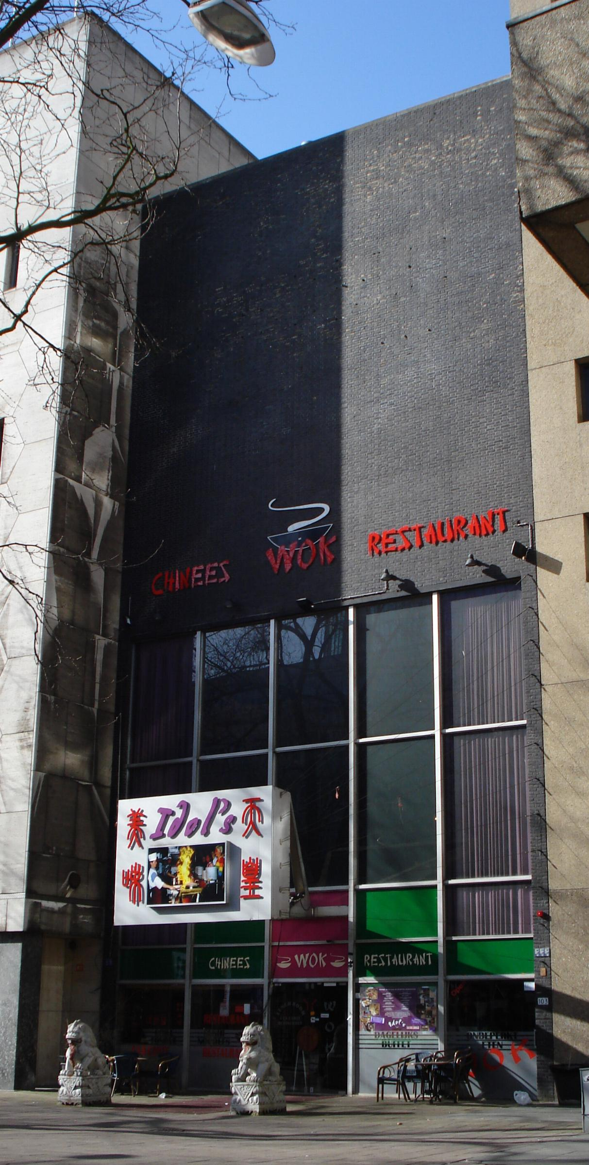 Rotterdam, Coolsingel 103, voormalige bioscoop Cineac. Gemeentemonument.